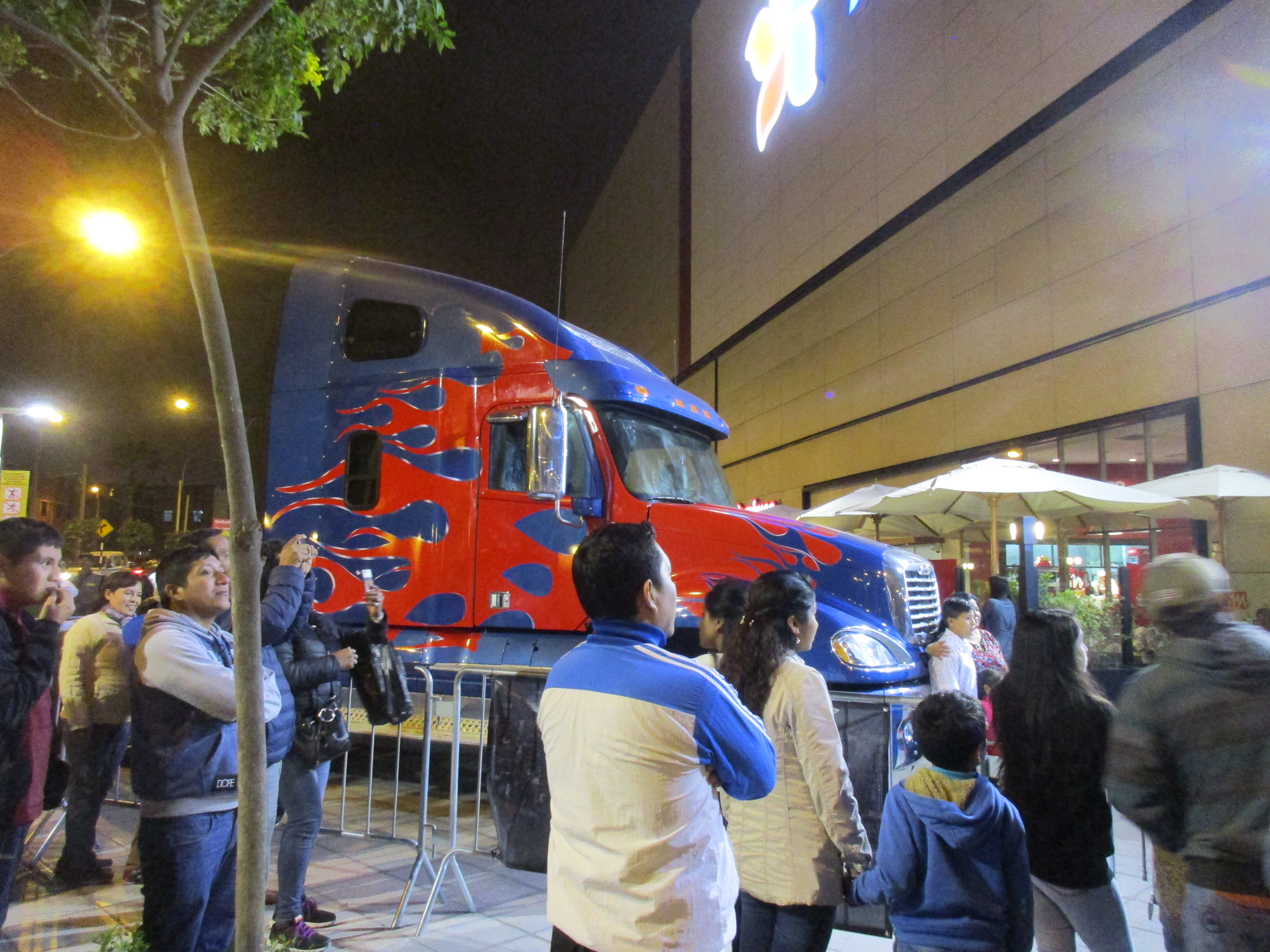 Propaganda de Transformers: The Last Knight a las afueras del Mall del Sur en Lima, Perú.